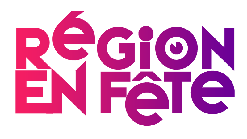 LOGO DE L'EMISSION REGION EN FETE